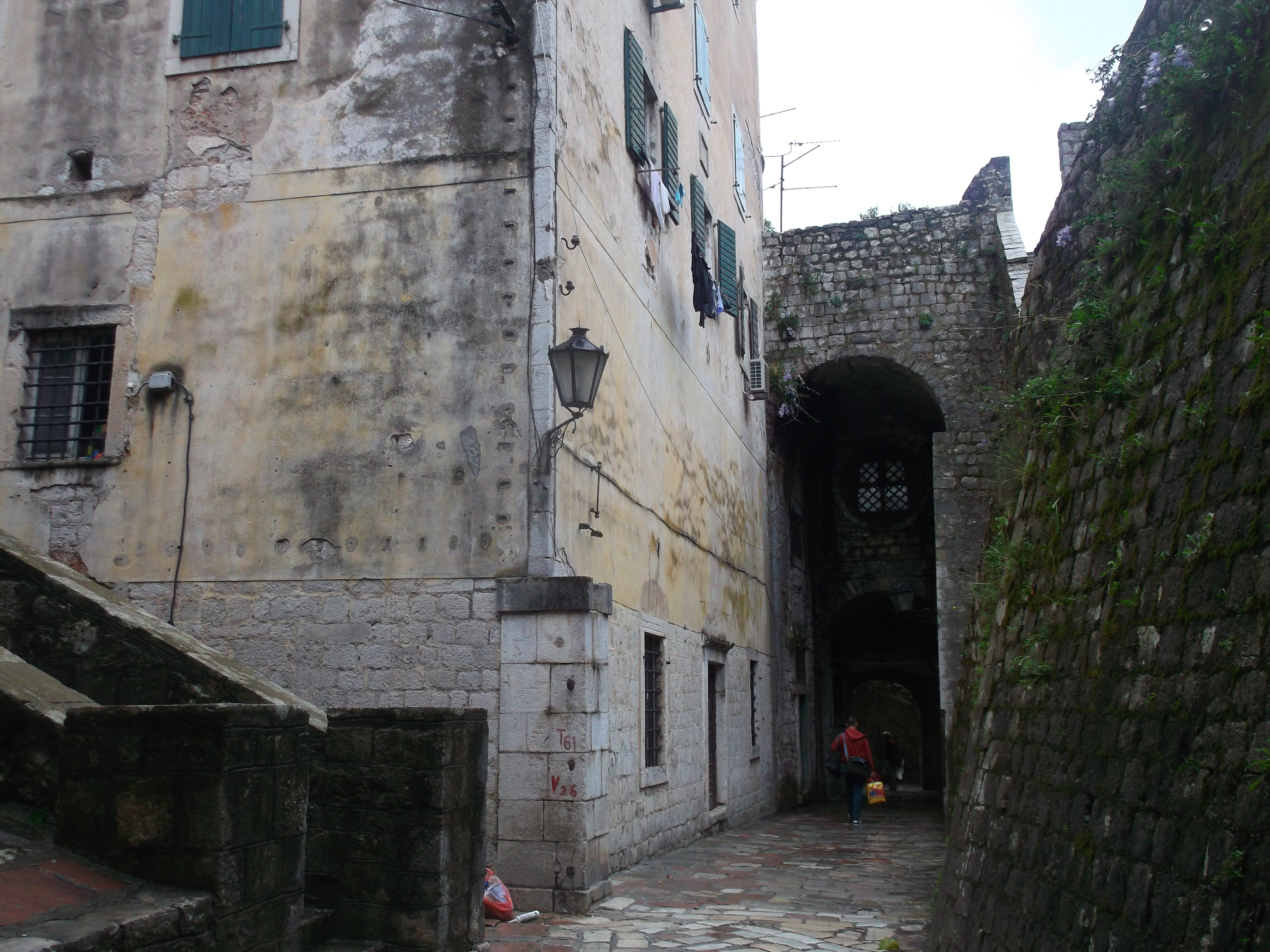 Stari grad Kotor, Kotor, Montenegro